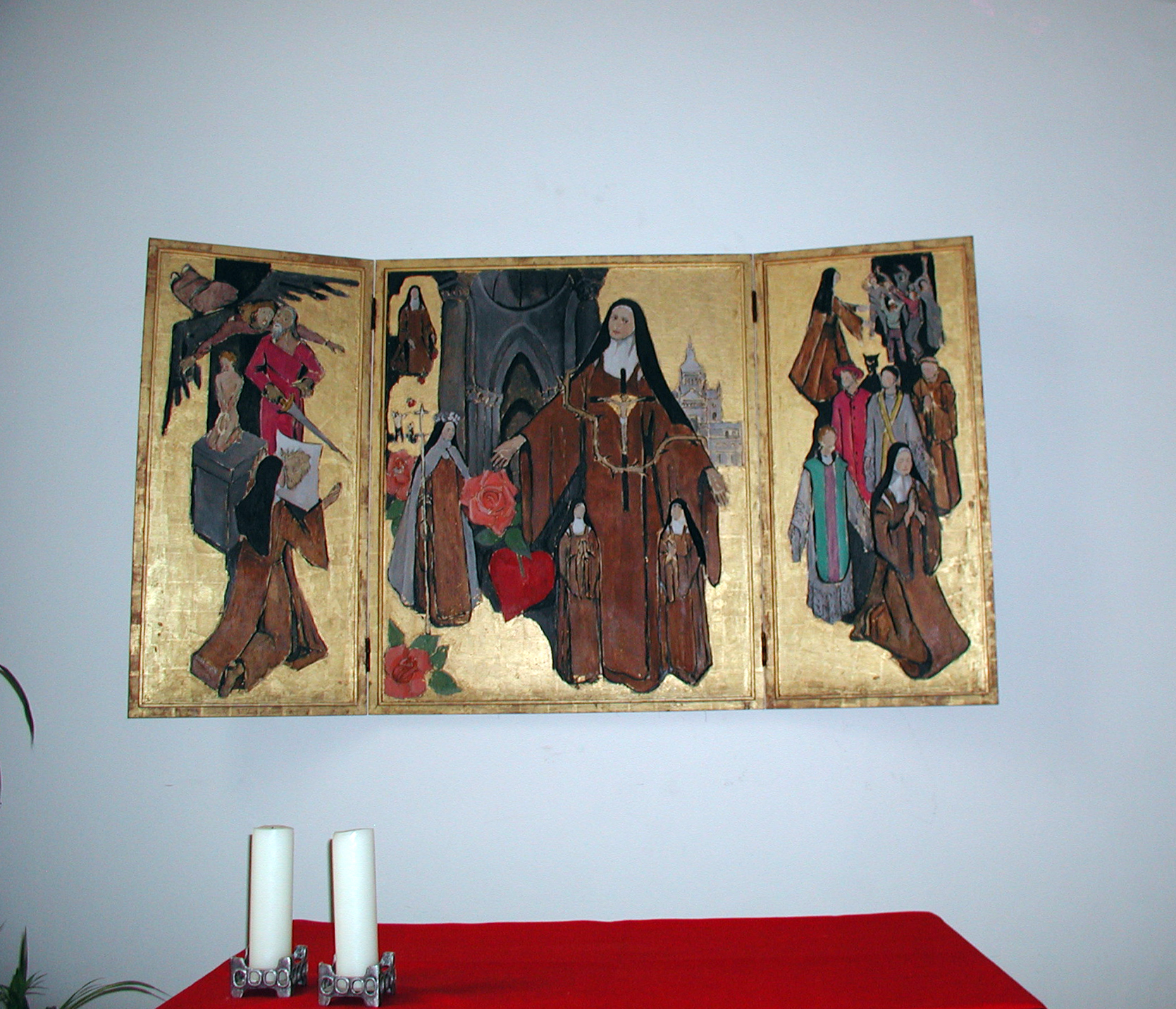 St. Maria vom Frieden, Köln, Triptichon